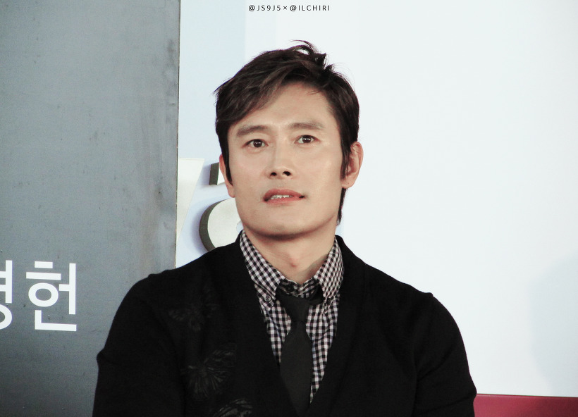 161007 부산국제영화제 오픈토크.